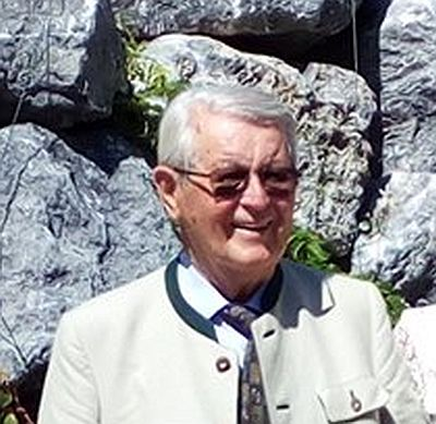 Heinrich Frommknecht bei einer (nachträglichen) Feier zu seinem 85. Geburtstag im Hofgut Dürren bei Waltershofen